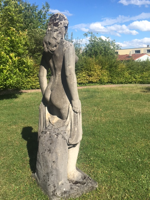 Photographie personnelle.